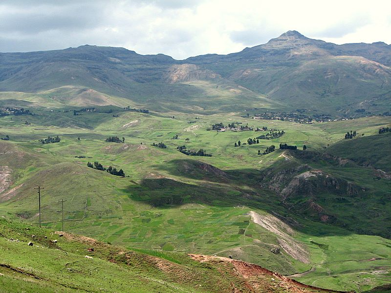 Los bellos alrededores de Huancavelica, como se puede ver desde la ruta.